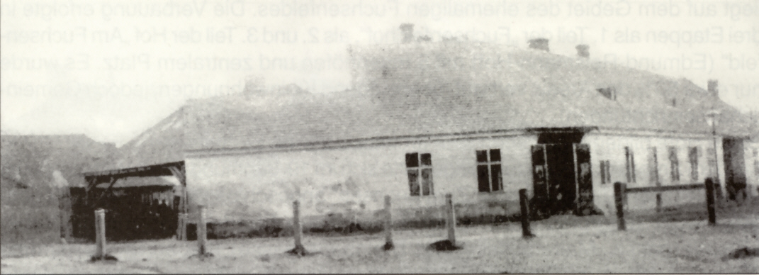 Gasthaus Zum Fuchsen, um 1880, namengebend für die Wohnhausanlage Fuchsenfeldhof in Wien-Meidling